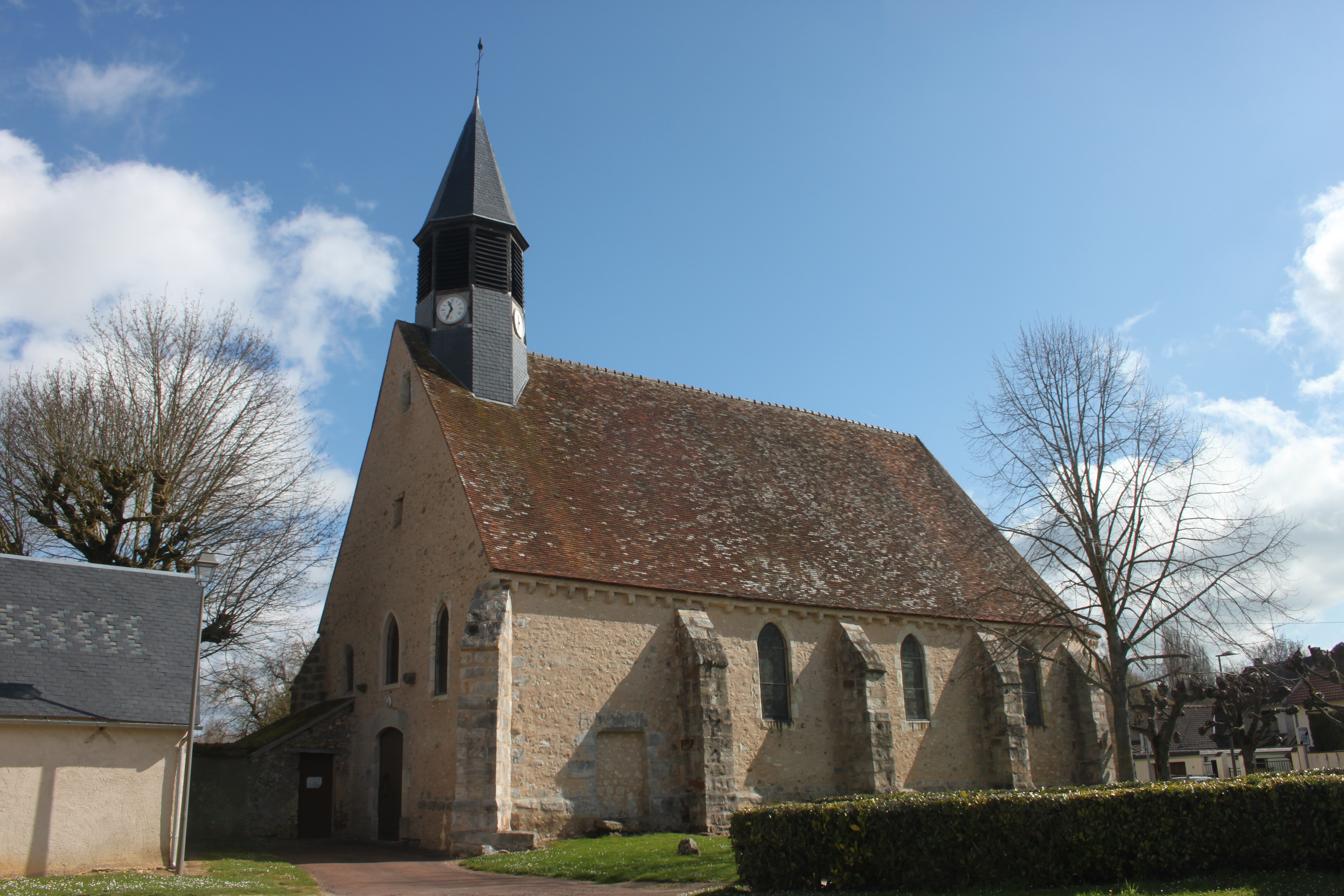 Église Saint-Martin de Yermenonville en Eure-et-Loir (France).